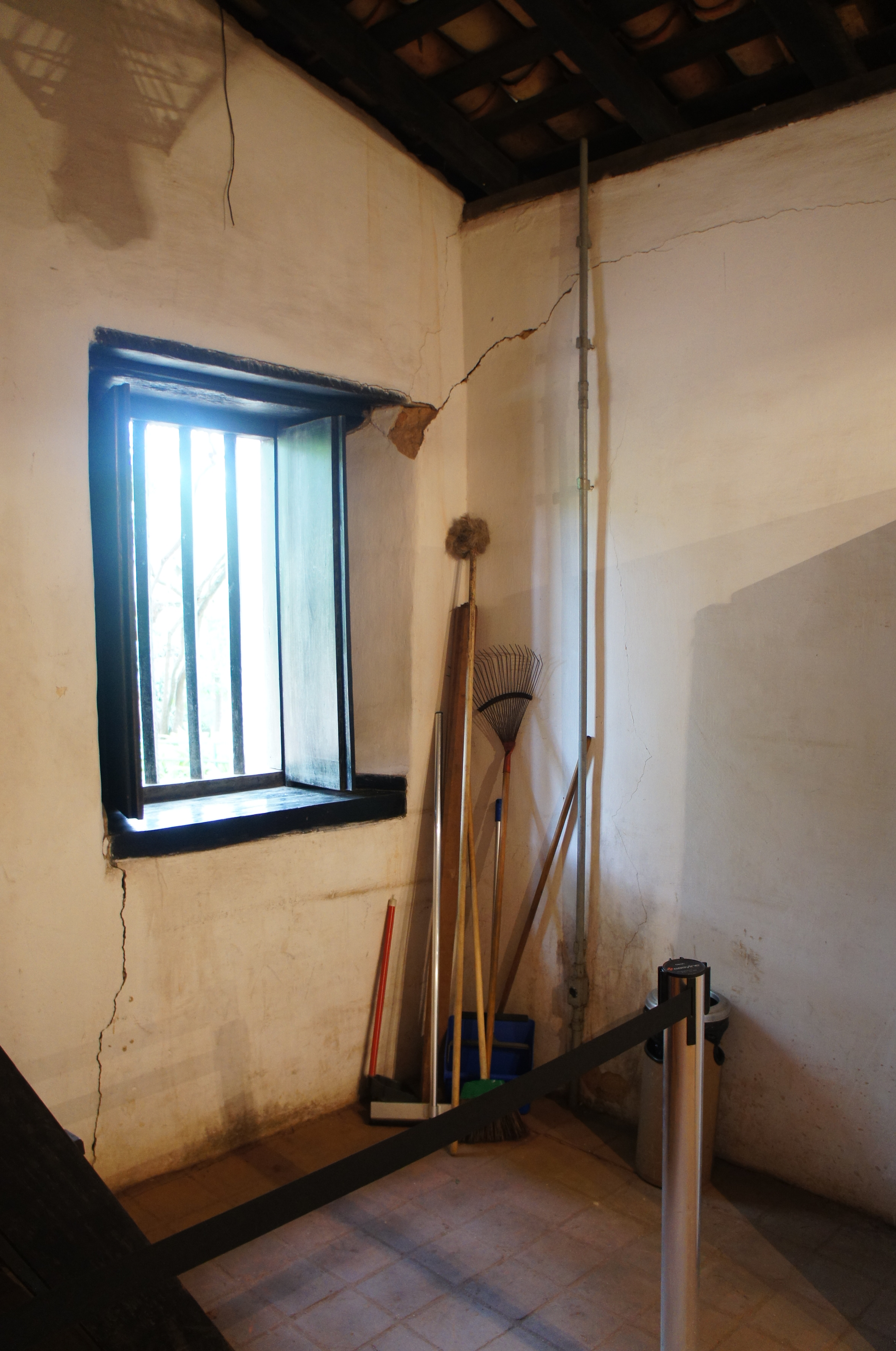 Rachaduras internas da Casa Sítio da Ressaca, em São Paulo (SP), Brasil.